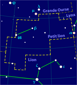 Carte pour la constellation du Petit Lion Produite à l'aide du logiciel PP3